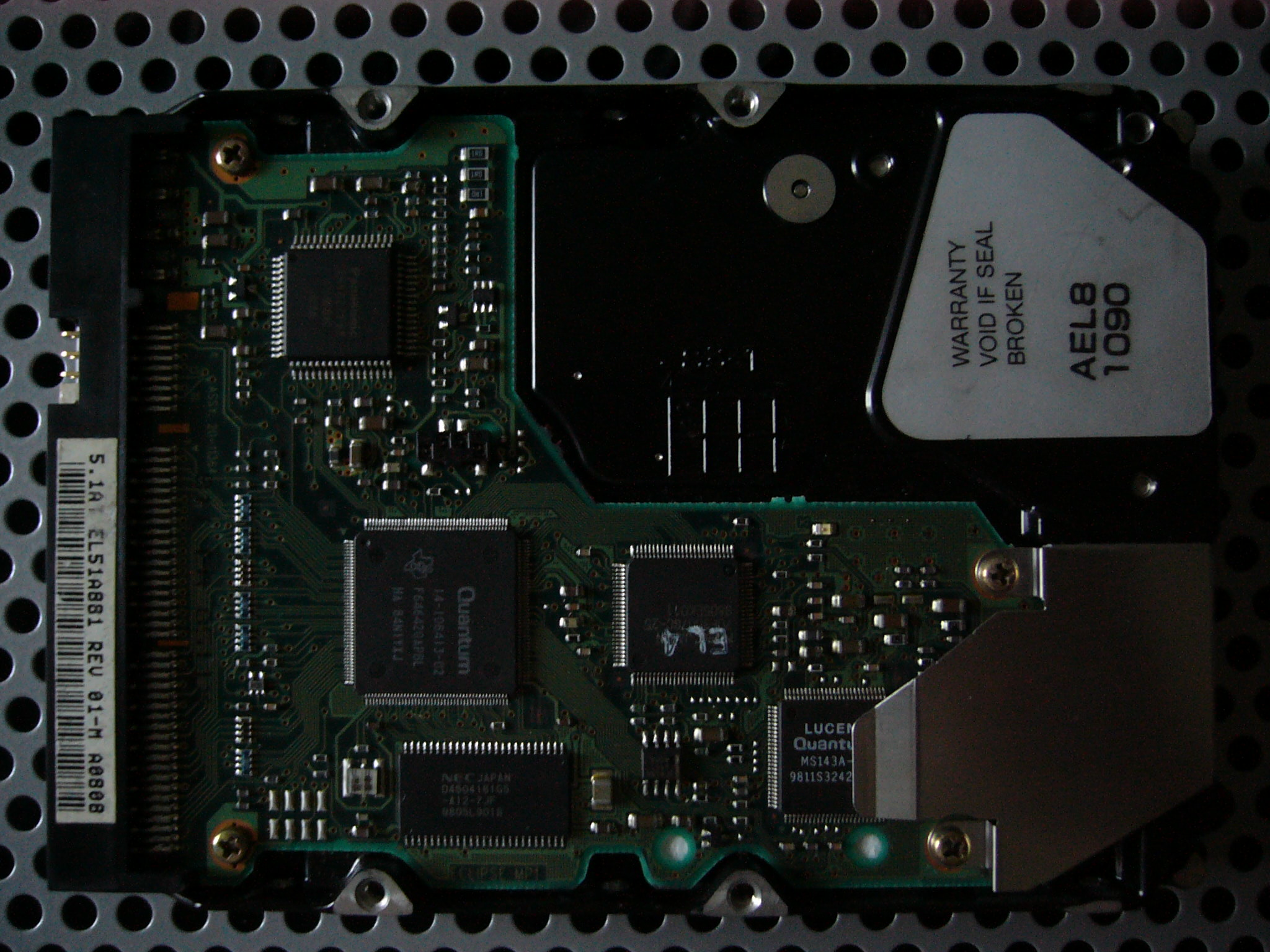 Quantum Fireball EL51A881 3.5吋硬碟背面